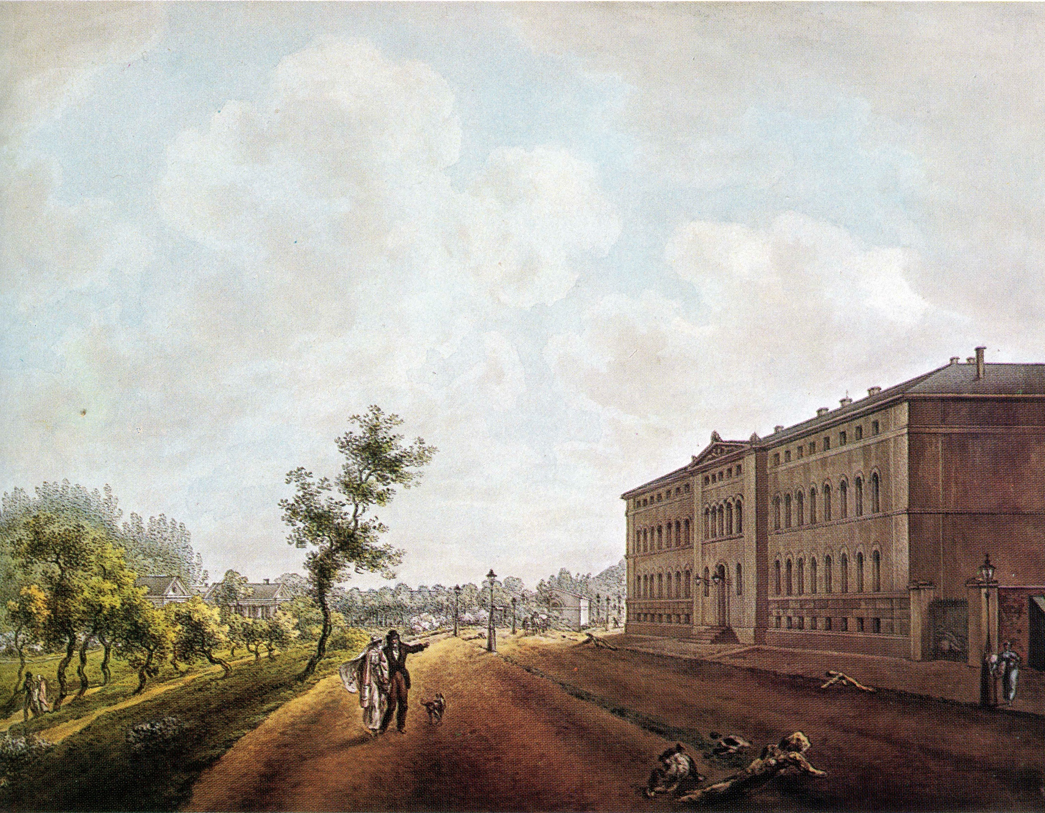 Foto eines Gouachegemäldes von dem Maler Carl Friedrich Stange um 1845